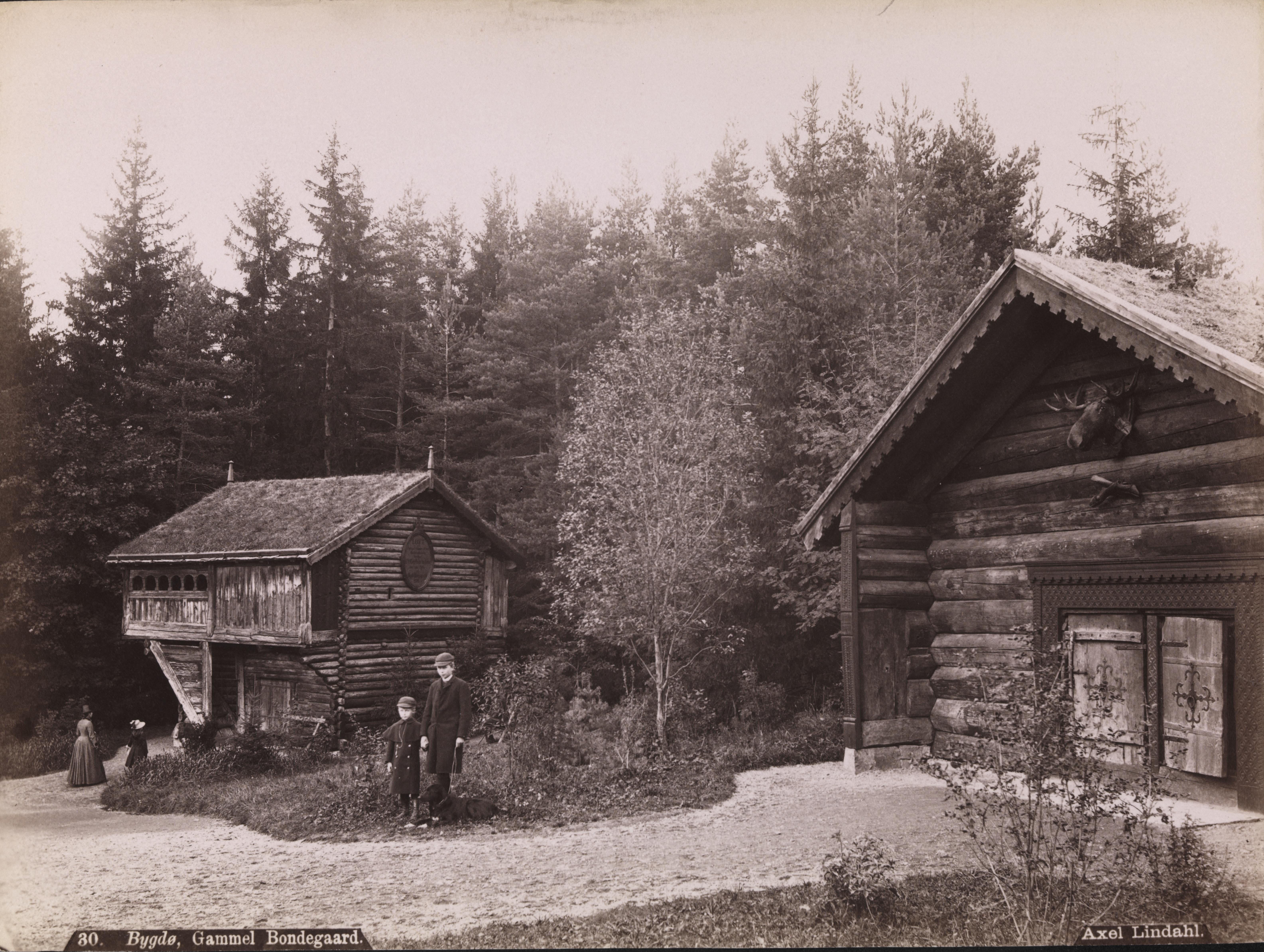 Sted: Kommune: Fylke: Tagger: Til venstre stabburet, til høyre røykestua. Over døra på røykestua henger det et elghode. Foran stabburet står det to uidentifiserte gutter, den ene gutten holder en hund i bånd. På stien bak stabburet går det en uidentifisert kvinne og ei uidentifisert jente bygninger friluftsmuseum stabbur arkitekturfotografi landskapsfotografi